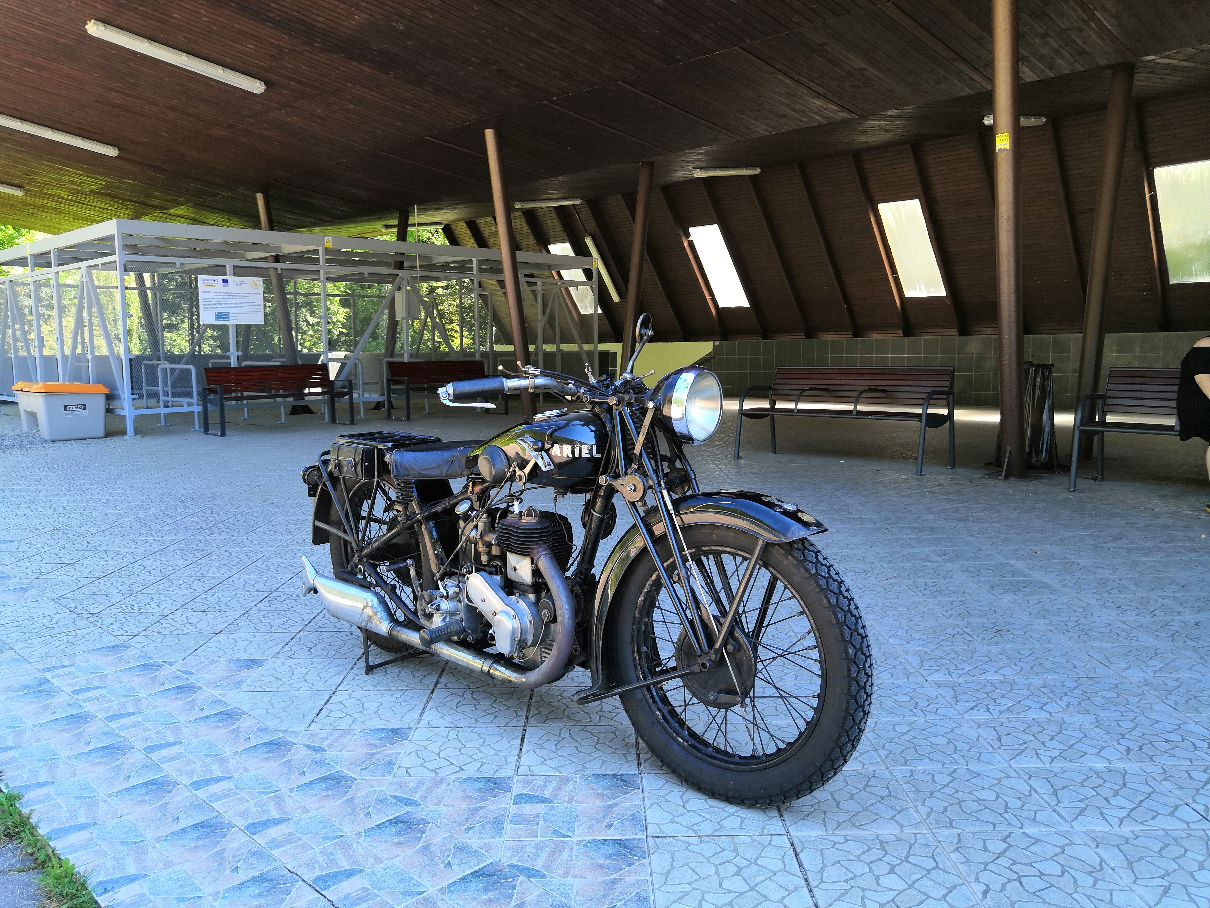 Motocykel Ariel (1929) - Dopravné múzeum